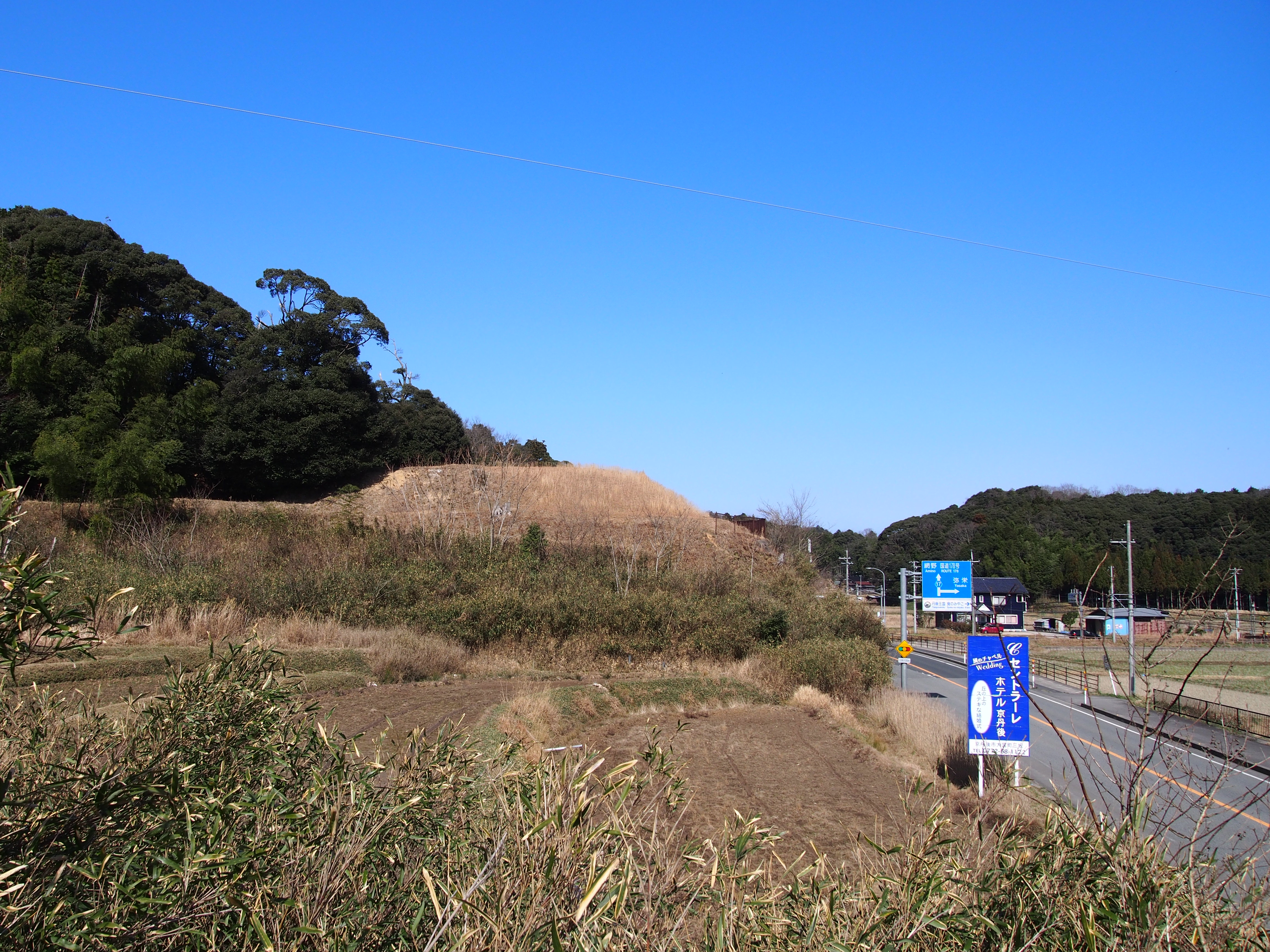 国指定史跡 赤坂今井墳墓（京都府京丹後市峰山町赤坂） 南側からの遠景、右下が府道17号線